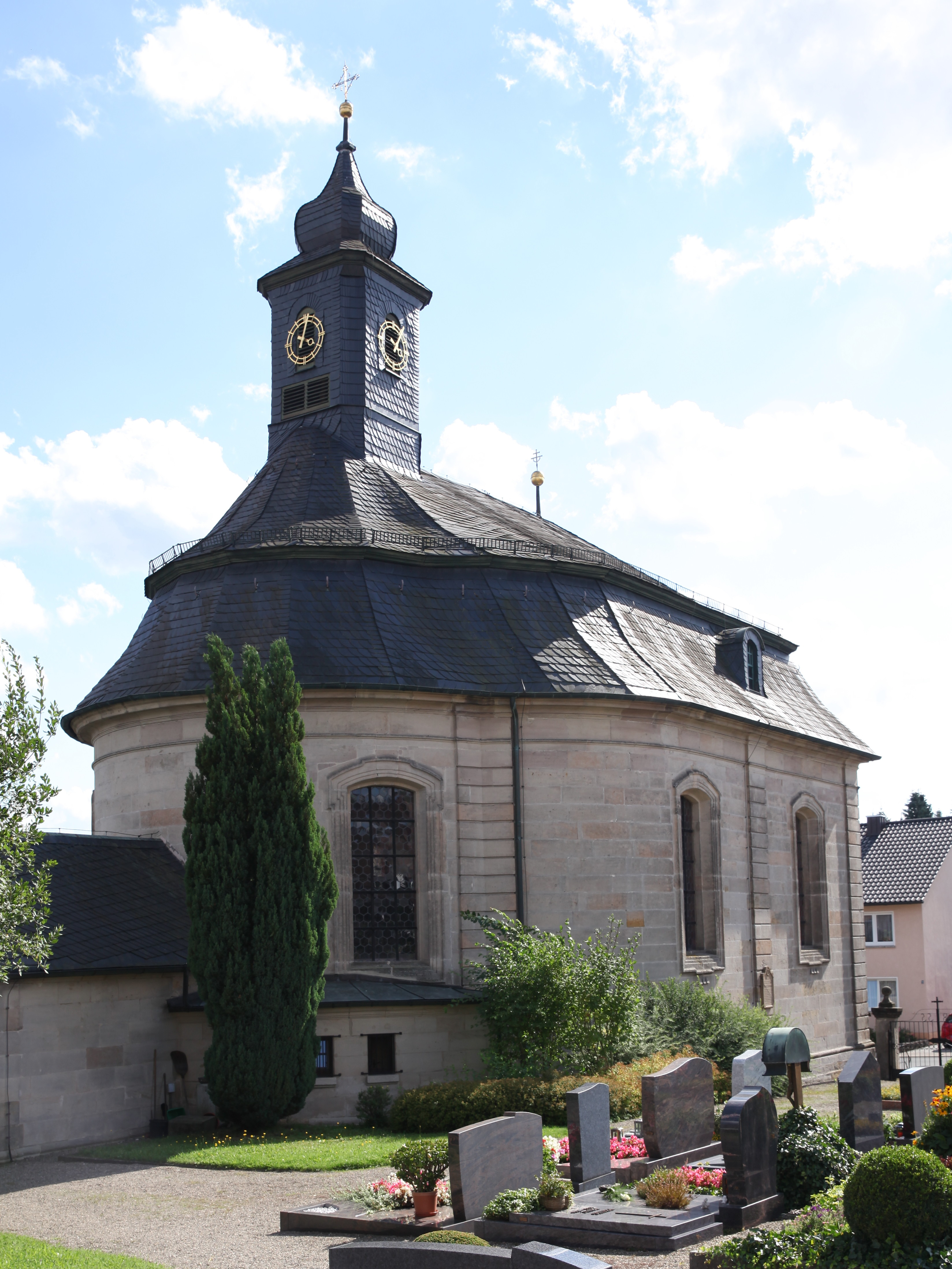 St. Laurentius in Lettenreuth